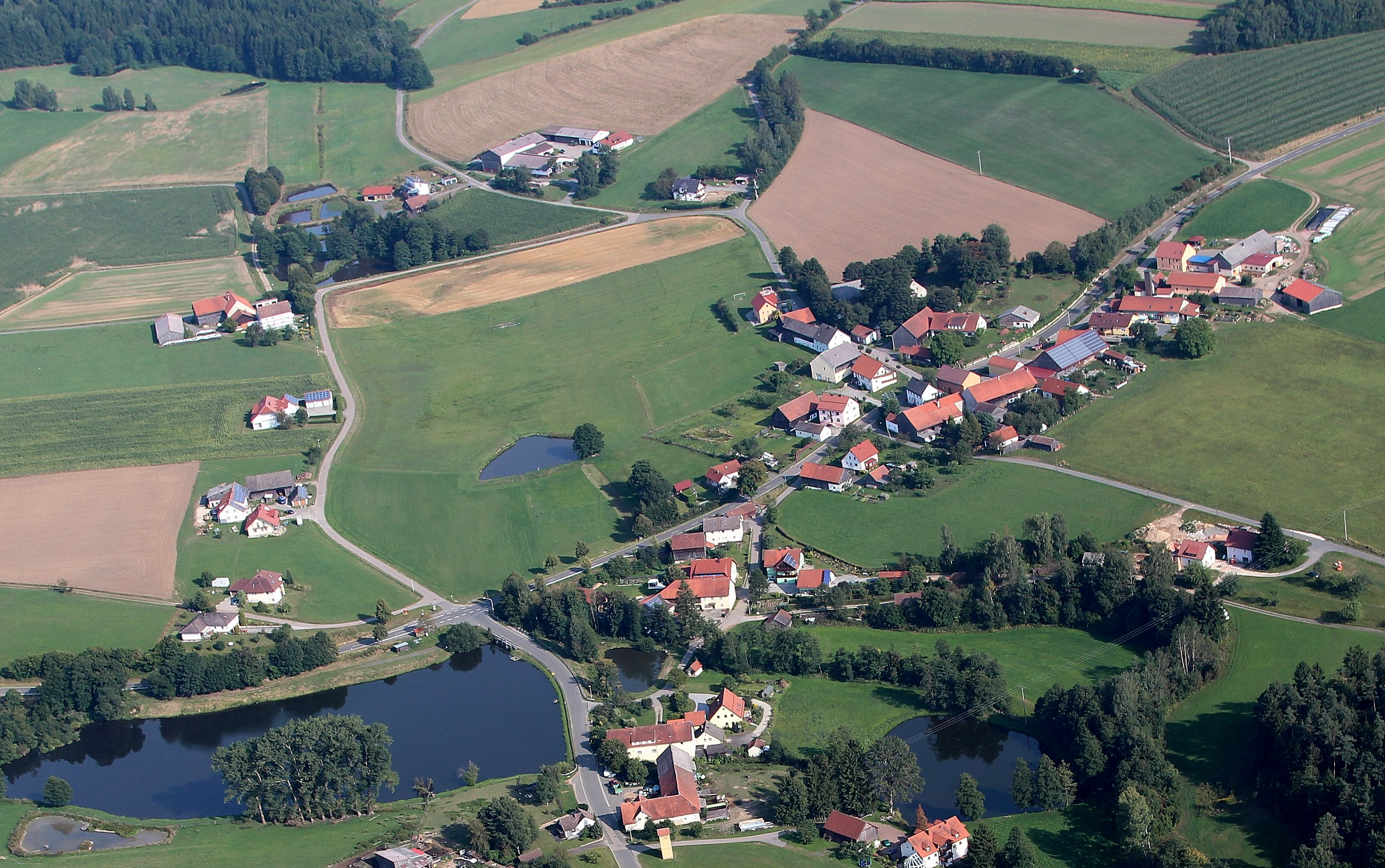 Pirkhof ist ein Ortsteil der Stadt Oberviechtach, Landkreis Schwandorf, Oberpfalz, Bayern